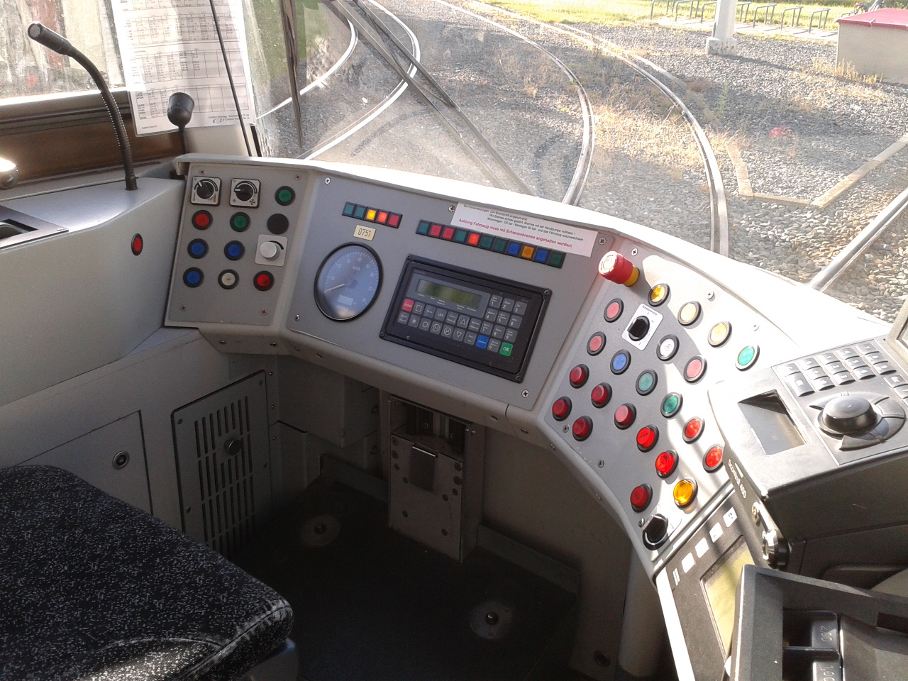 Führerstand des NGT8D (Wagennummer 0751) aus Braunschweig an der Haltestelle "Grenzweg".